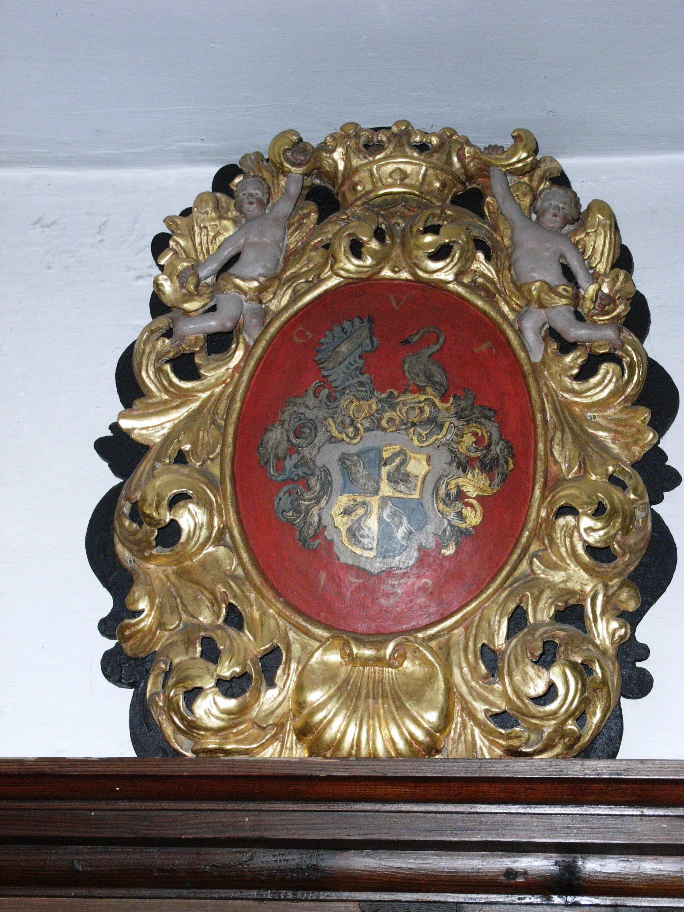 Wappen "G V F" (G. von Furtenbach), eines der vielen Wappen der Kirchenspender in der Dreieinigkeitskirche Buxach aus dem 18. Jahrhundert, Jahreszahl: 1732